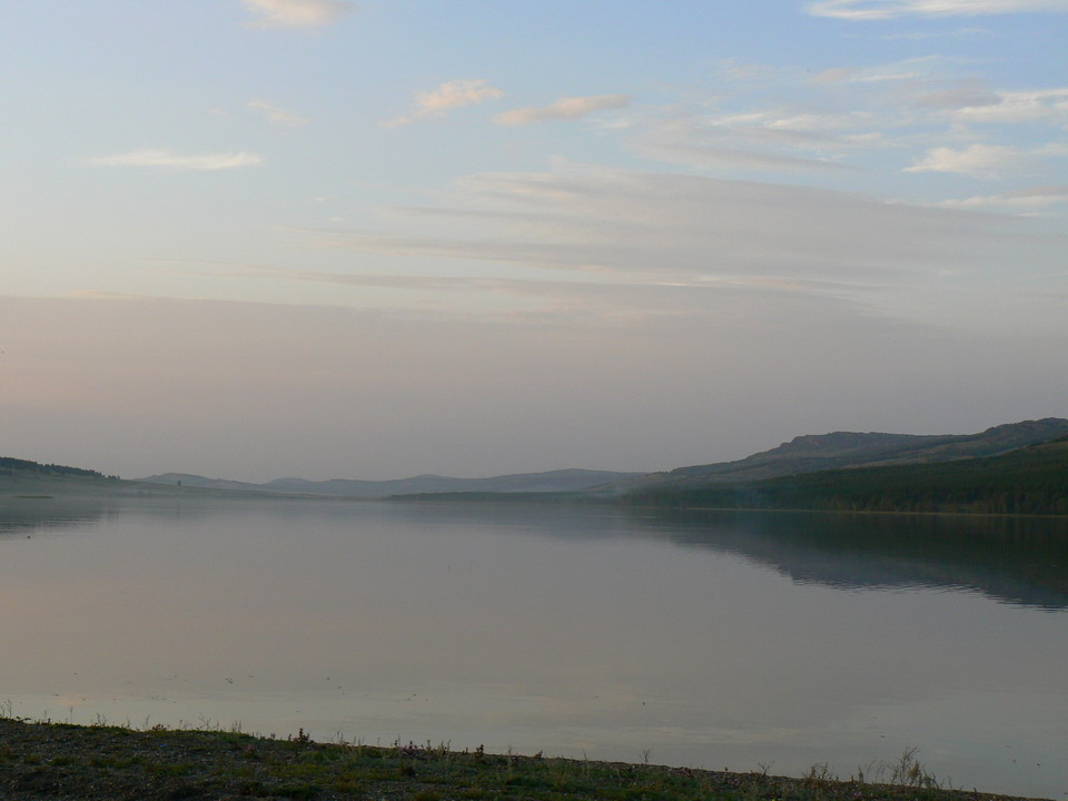 Озеро Талкас и хребет Ирендык, Южный Урал, Башкортостан.